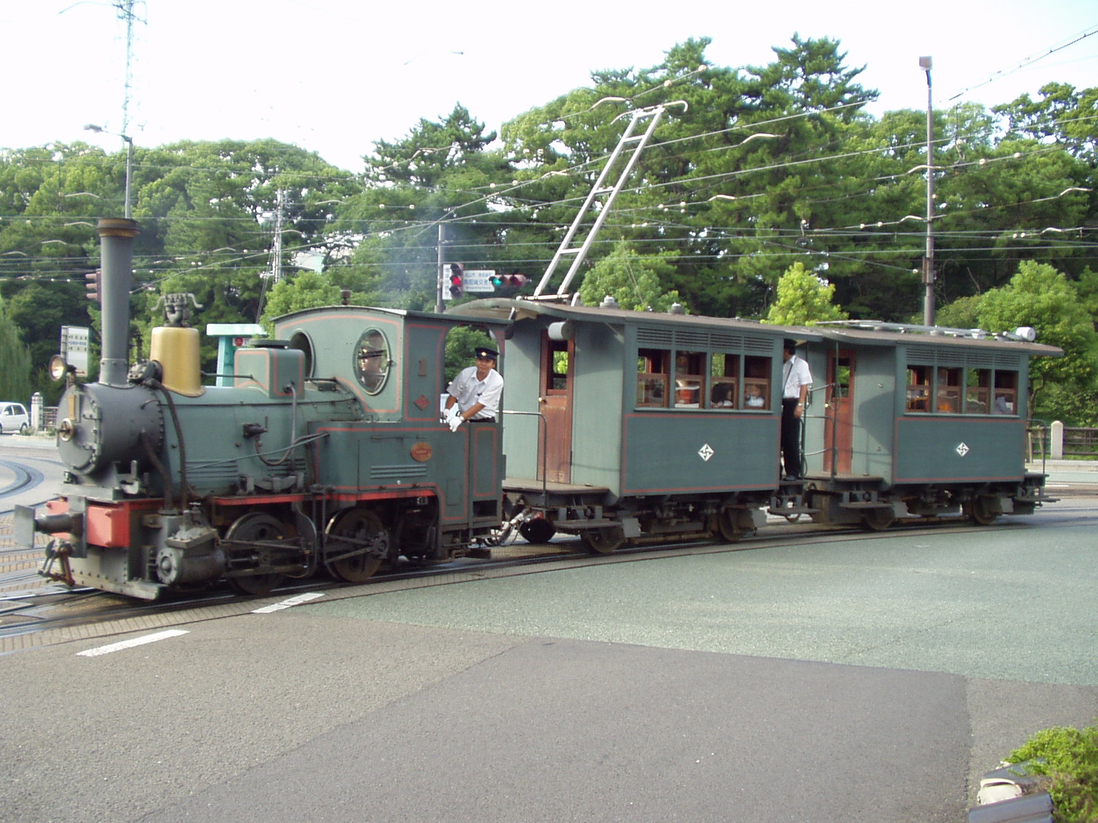 松山市南堀端にて撮影。撮影者 - Daichan